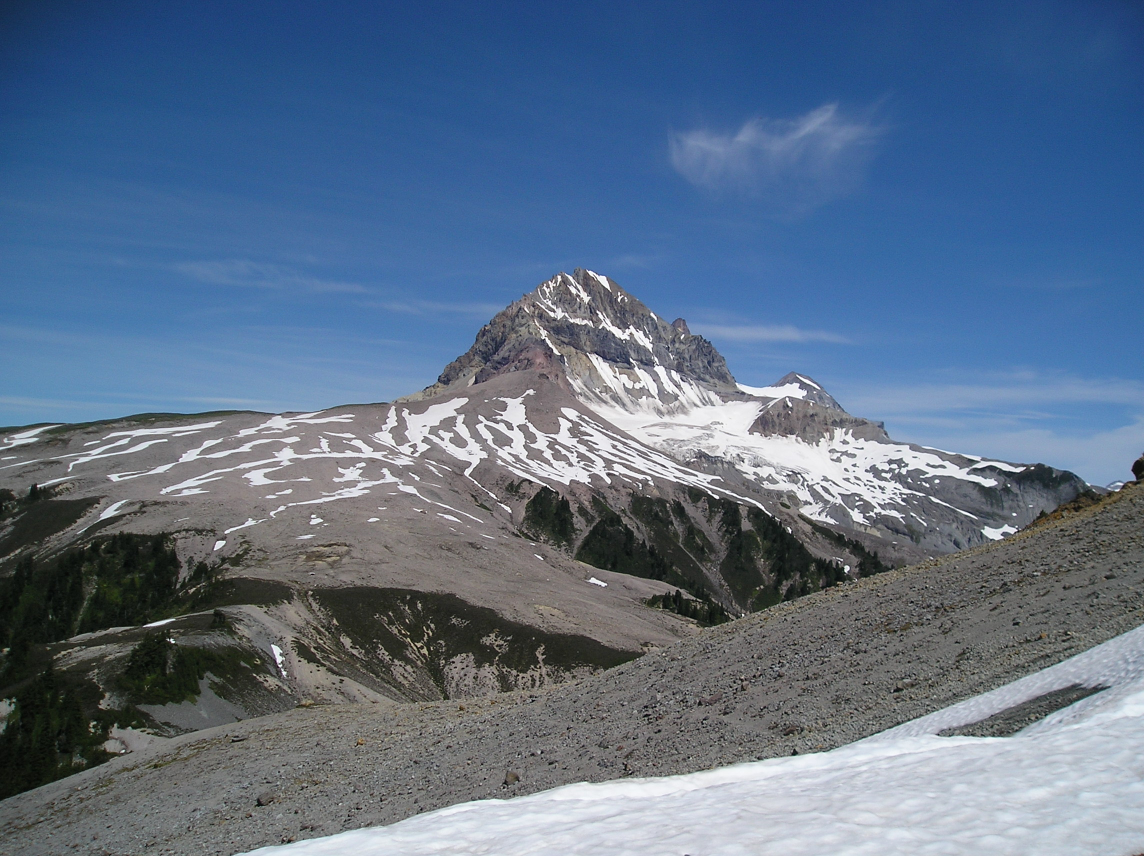 Atwell Peak, Garibaldi Provincial Park